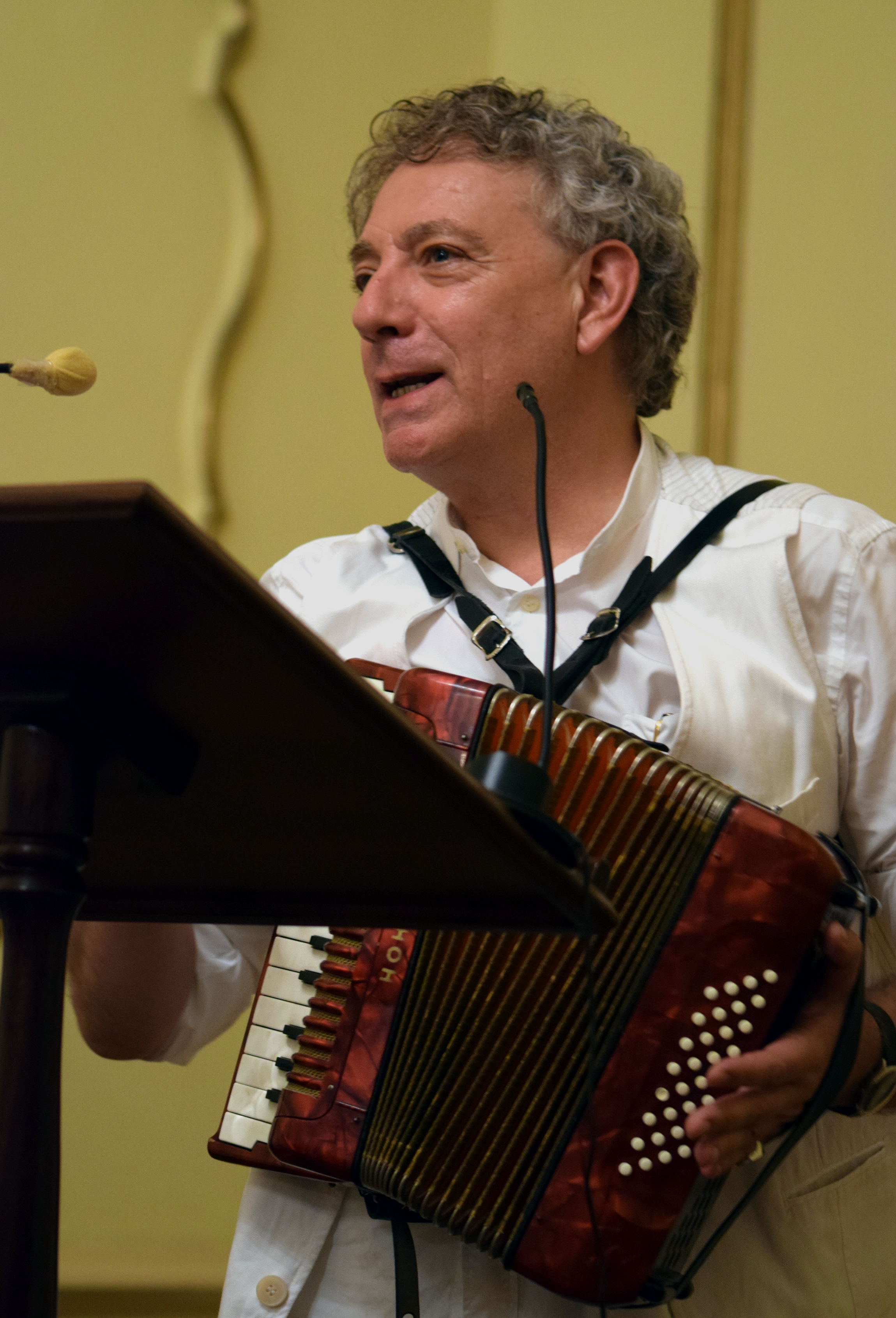 Juan Carlos Mestre recitando en el Real Club Nautico de Sta. Cruz de La Palma en el II Encuentro de Escritores celebrado entre los días 4 al 8 de Octubre de 2017 en honor al fallecido poeta palmero Felix Francisco Casanova.